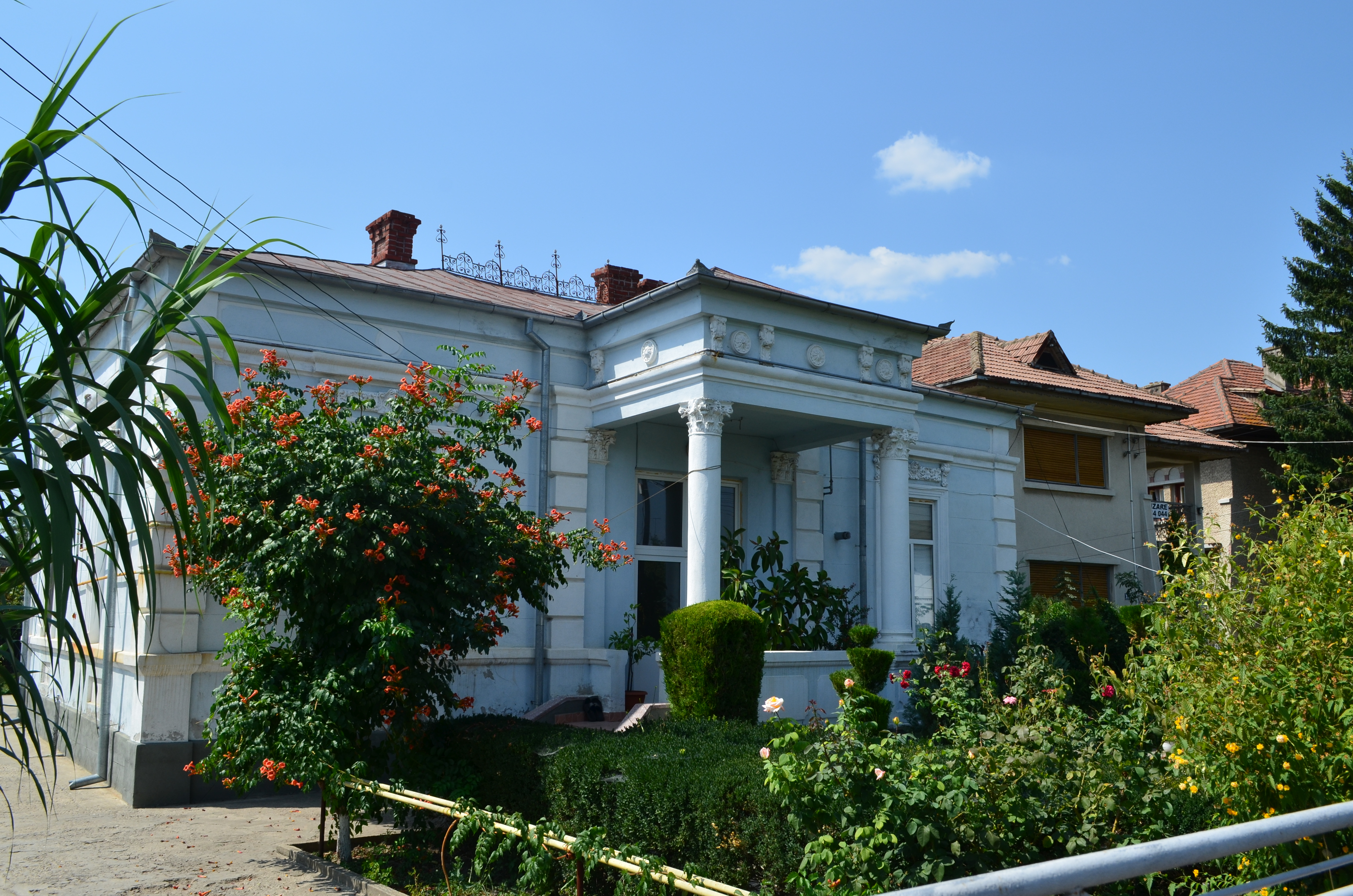 Casa Ion Păduraru, Str. Ion Heliade Rădulescu nr. 13, Târgoviște